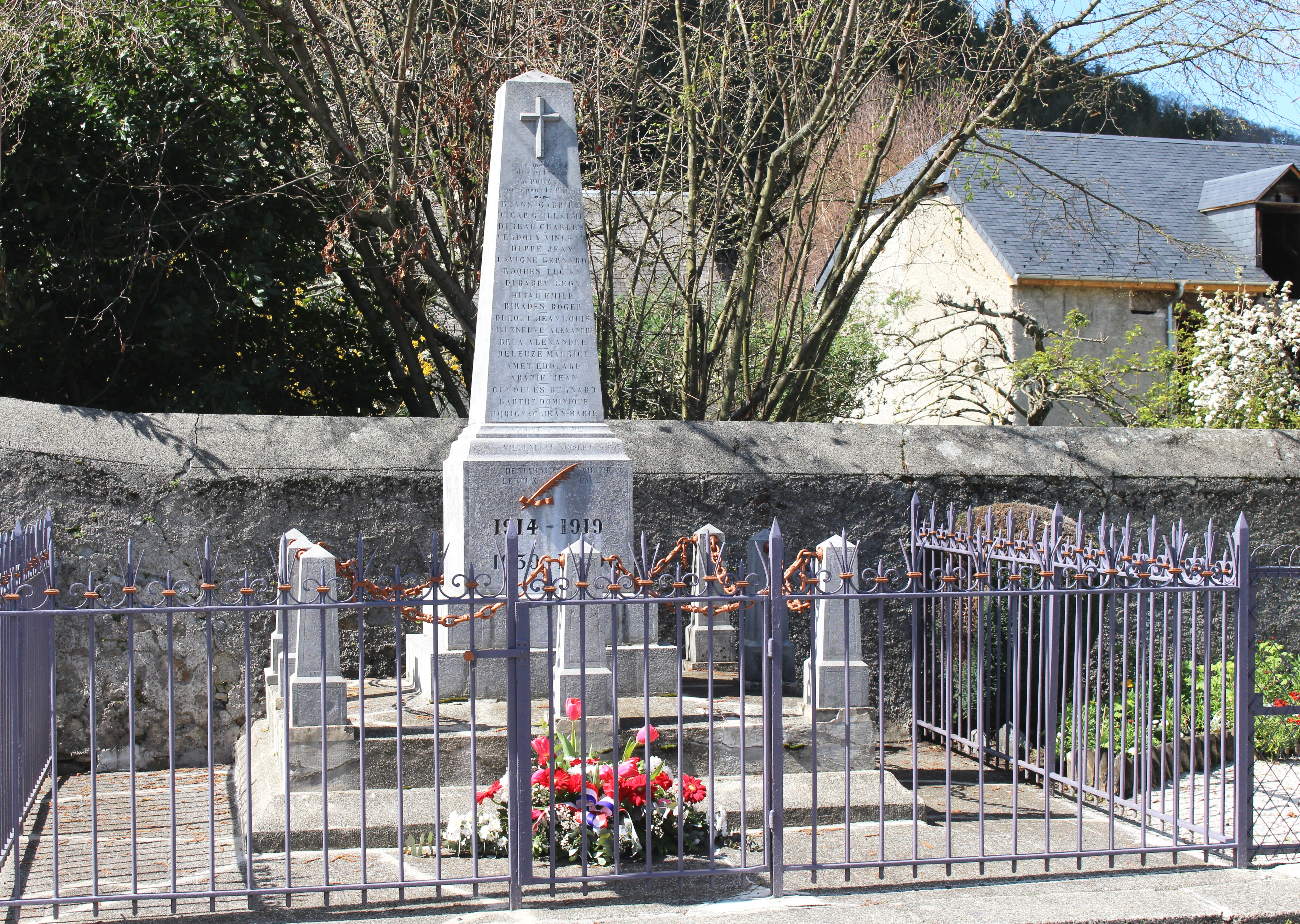 Monument aux morts de Pouzac (Hautes-Pyrénées)